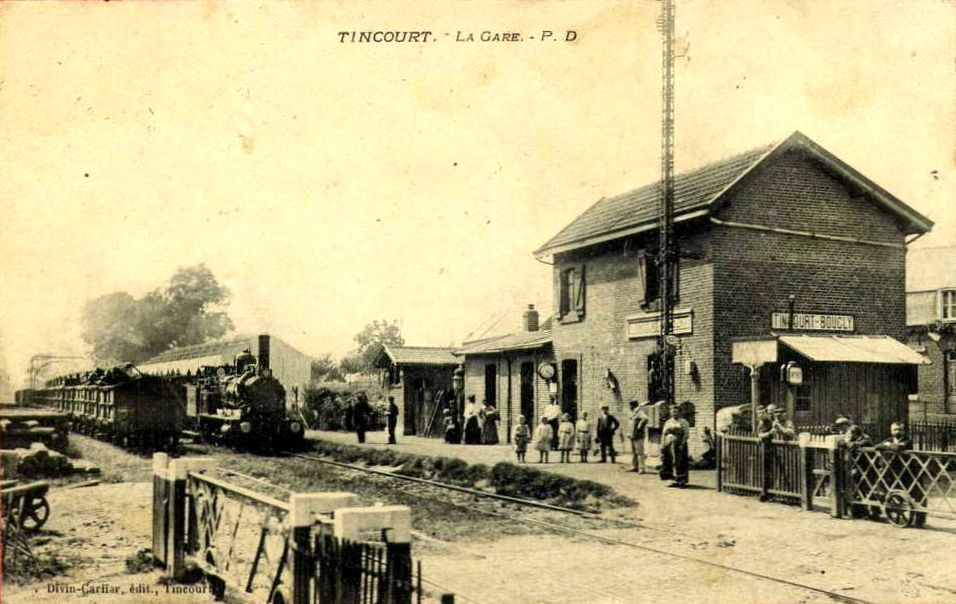 Train entrant en gare de Tincourt-Boucly, alors que le caractère d'une ligne d'intérêt local reste visible. Vers 1908/10, la voie sera doublée et le bâtiment-voyageurs remplacé par un édifice plus représentatif.